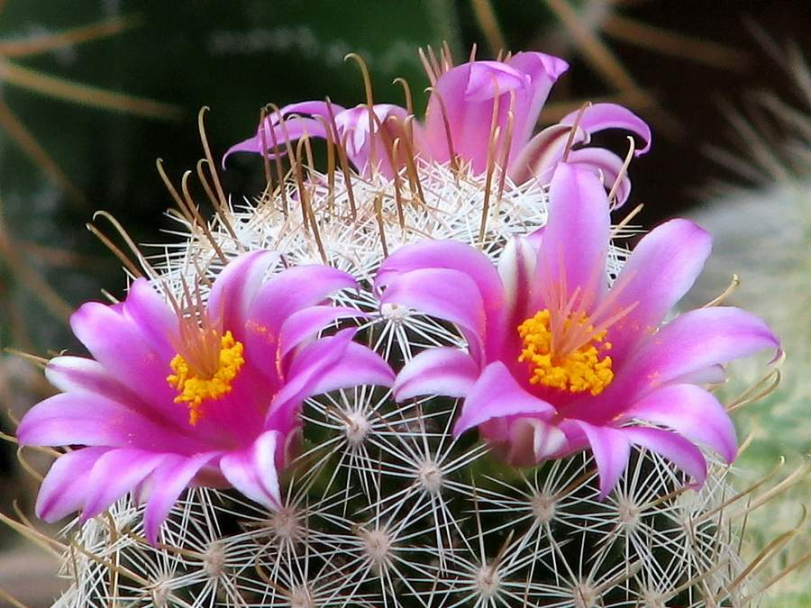 les belles fleurs